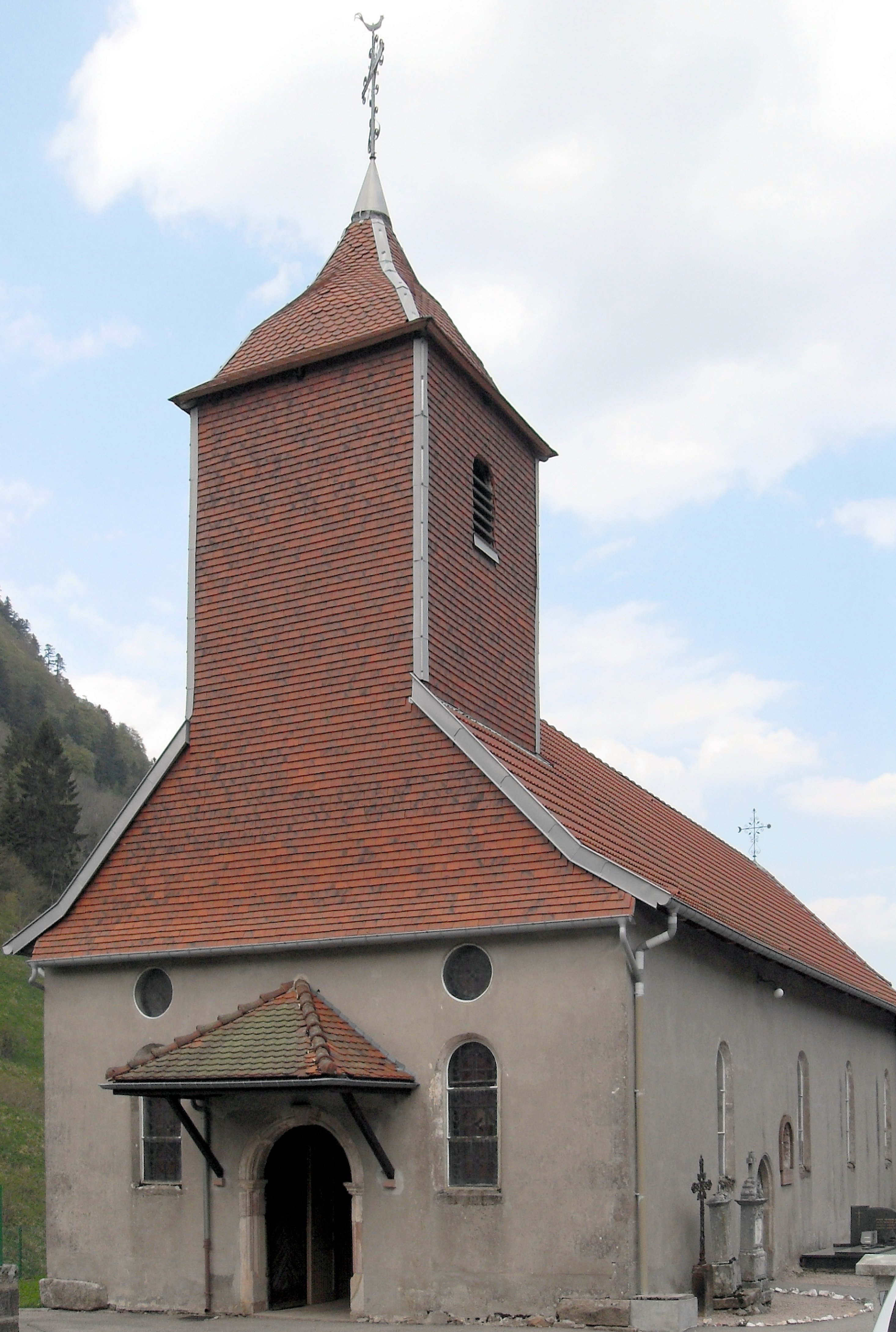 L'église Saint-Sylvestre à Valtin